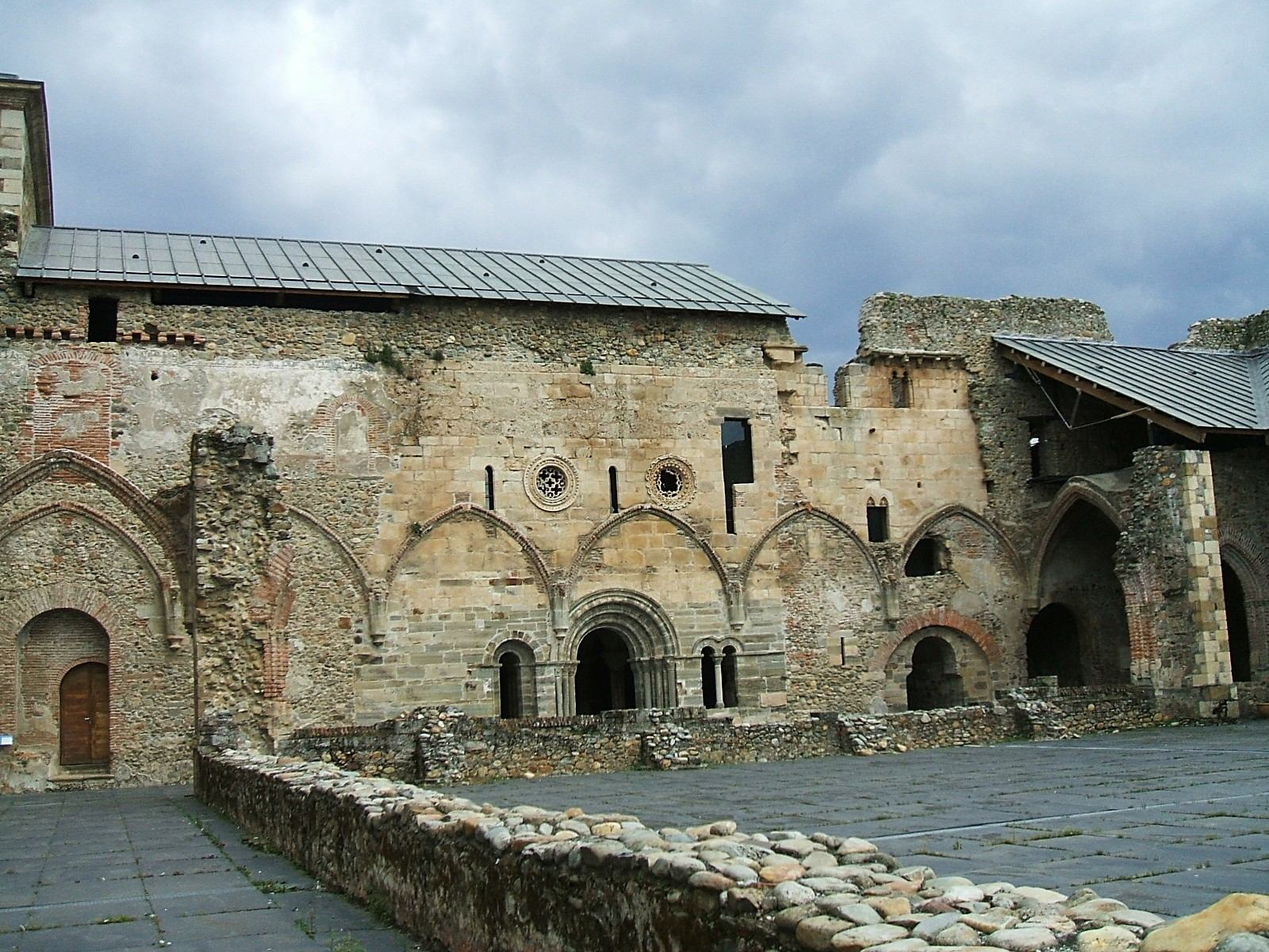 Claustro reglar del Monasterio de Santa María de Carracedo, en Carracedo del Monasterio, León, España